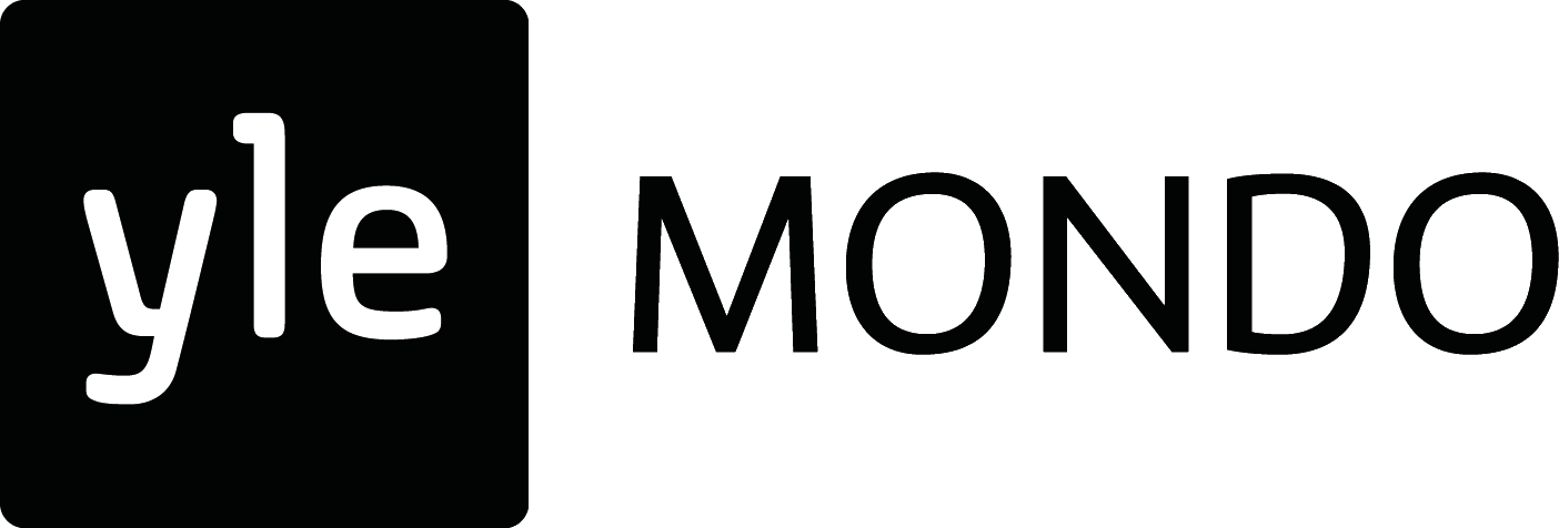 Yle Mondon logo